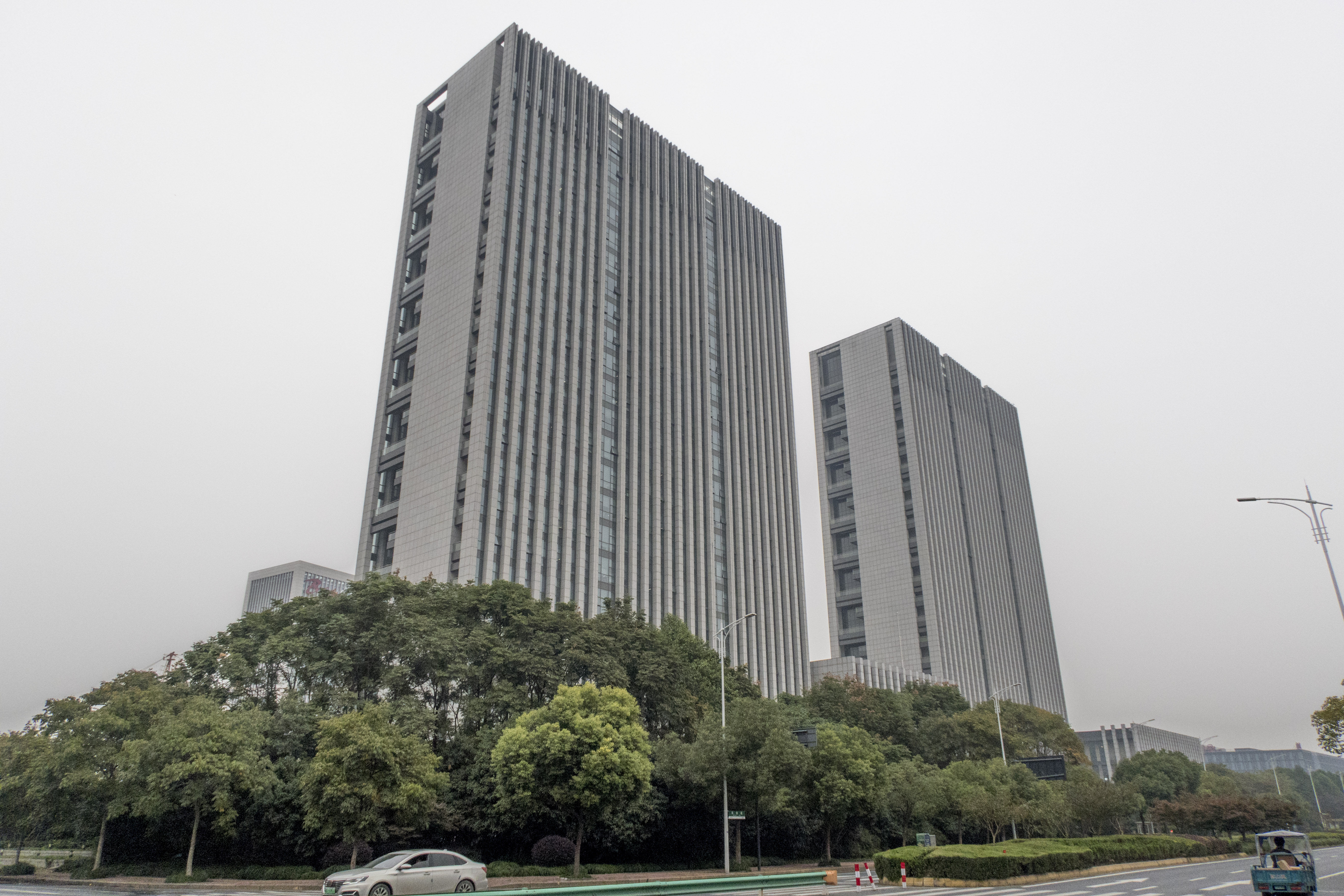 中国联合工程公司新大楼